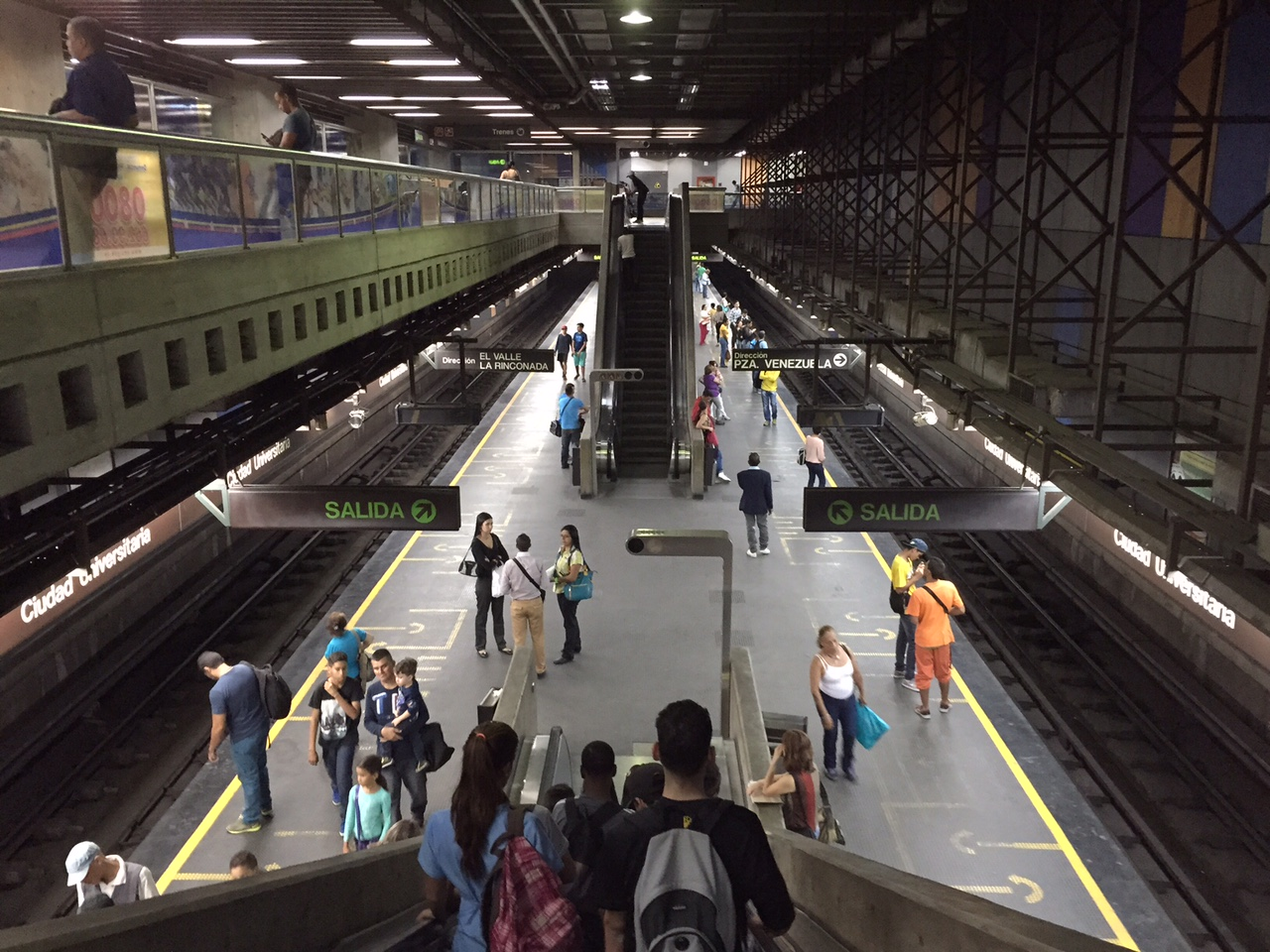 Estación Ciudad Universitaria en la Línea 3 del Metro de Caracas.